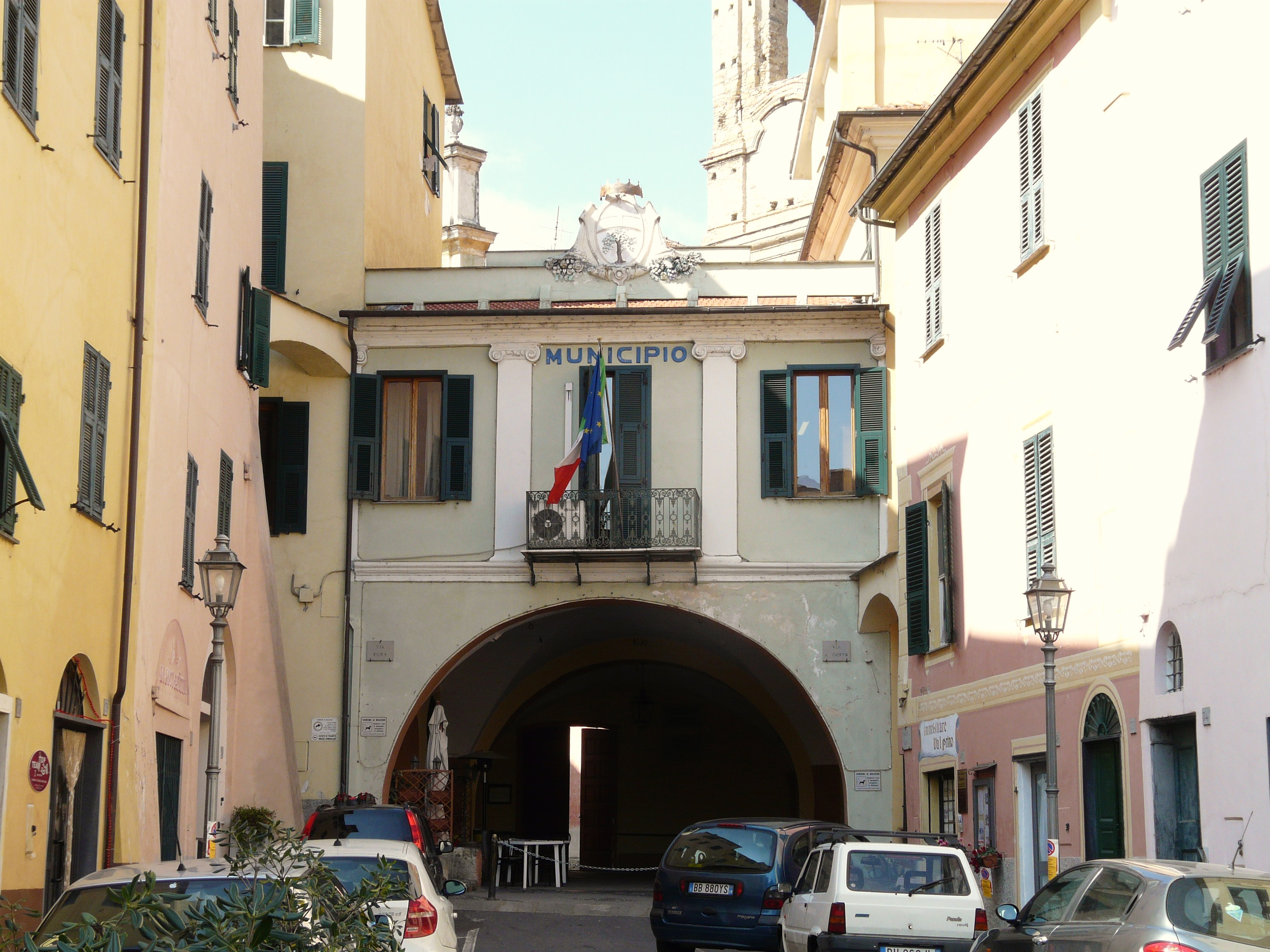 Municipio, Dolcedo, Liguria, Italia